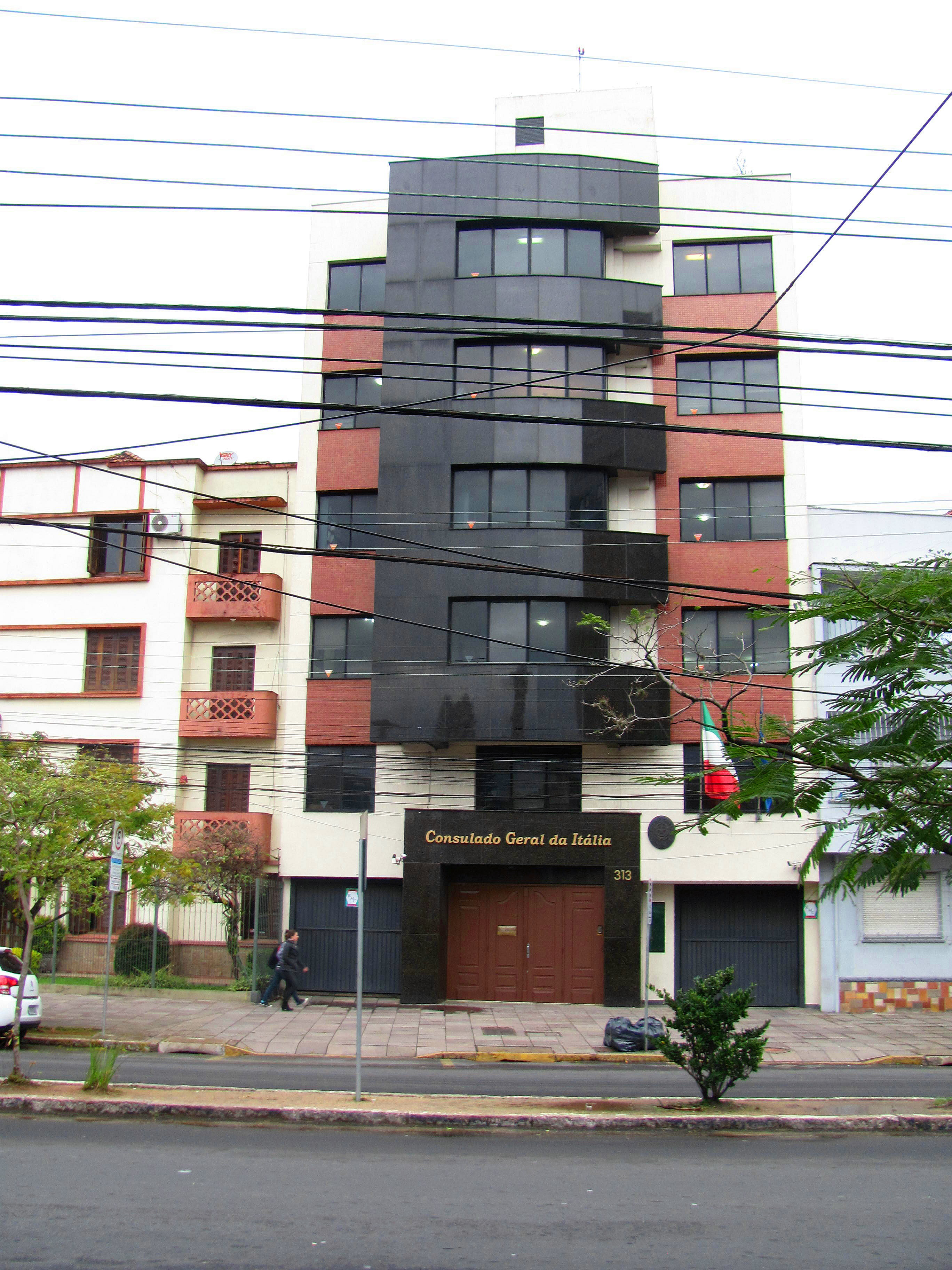 Consulado Geral da Itália, Porto Alegre